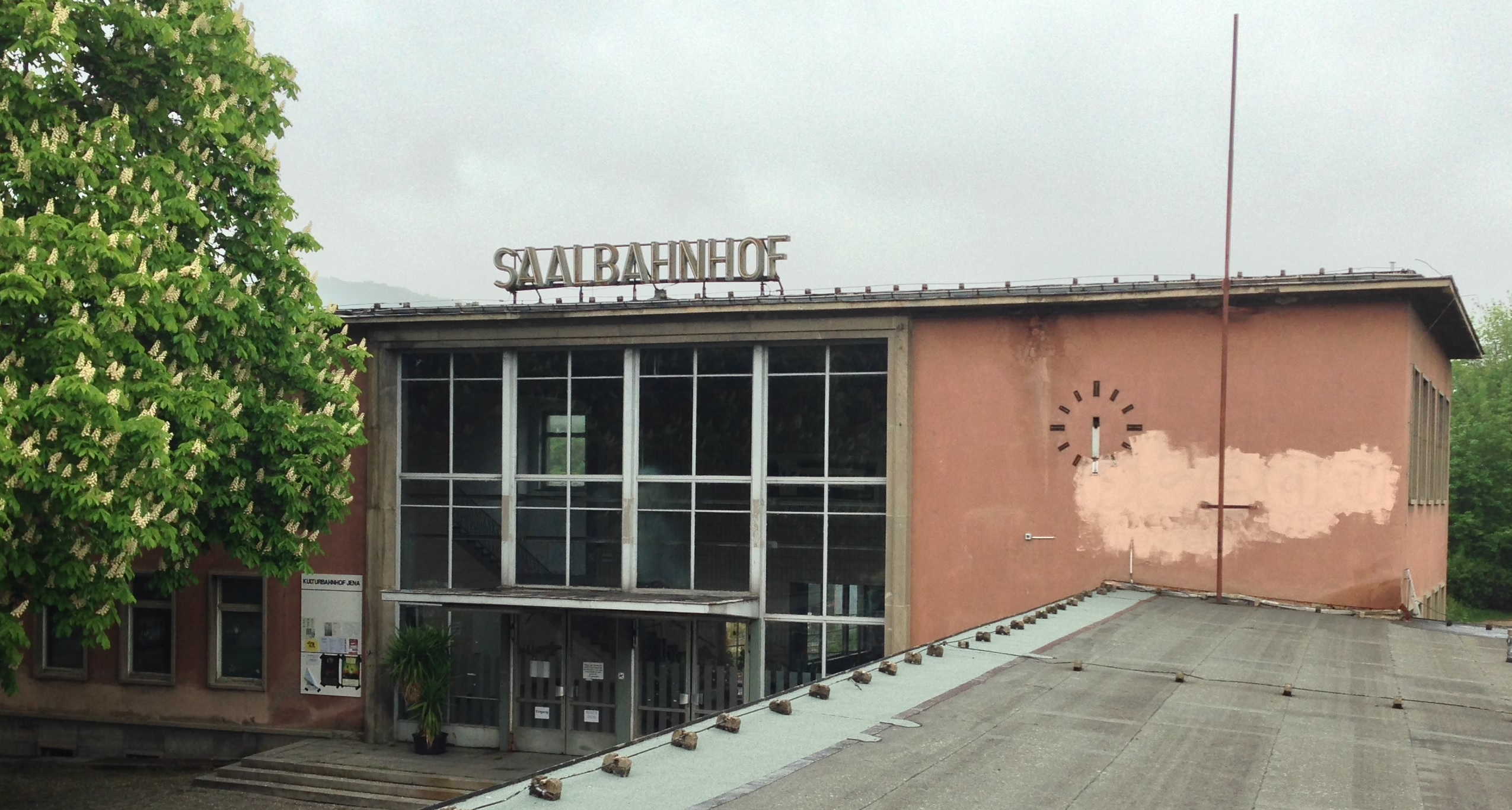 Kulturbahnhof Jena - Frontseite mit Vorplatz